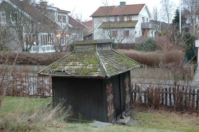 Lekstugan, Villa Soltorpet. Foto: Lena Emanuelsson. Fastigheten är byggnadsminne sedan 1983.